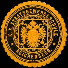 Sealing stamp Title: K.K. Staatsgewerbeschule Reichenberg Description: orange, schwarz, geprägt Place: Reichenberg size: 4 cm